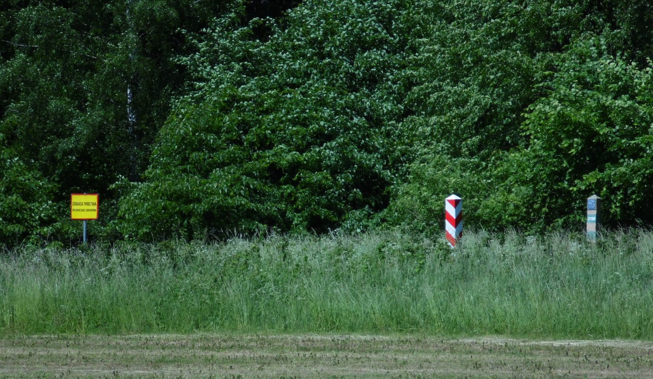 GRANICA PAŃSTWA.